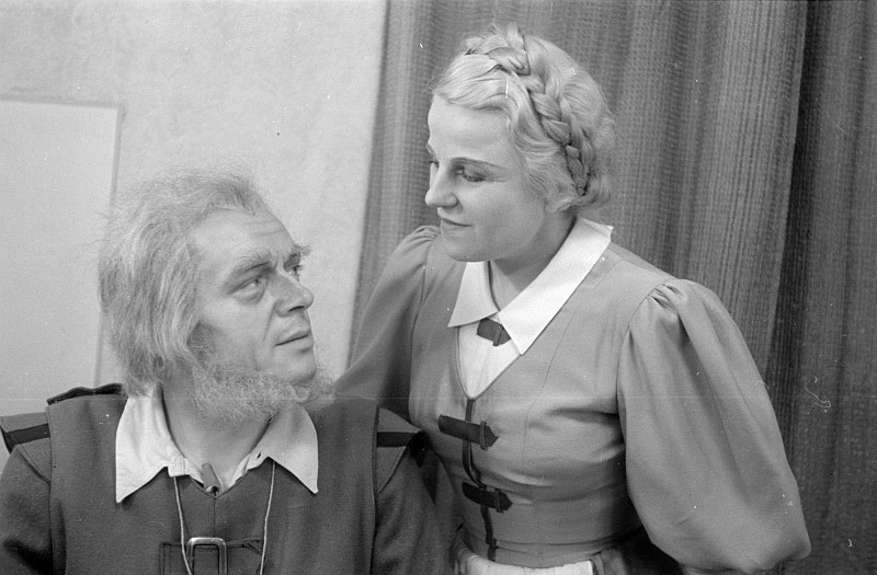 Original image description from the Deutsche Fotothek Szenenbilder